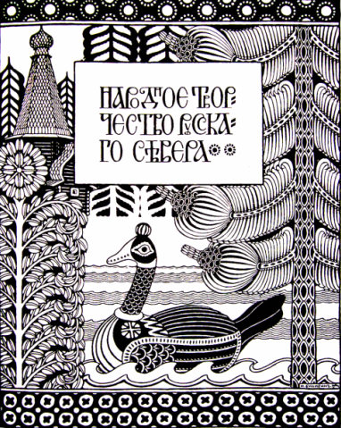 рисунок из журнала мир искусства